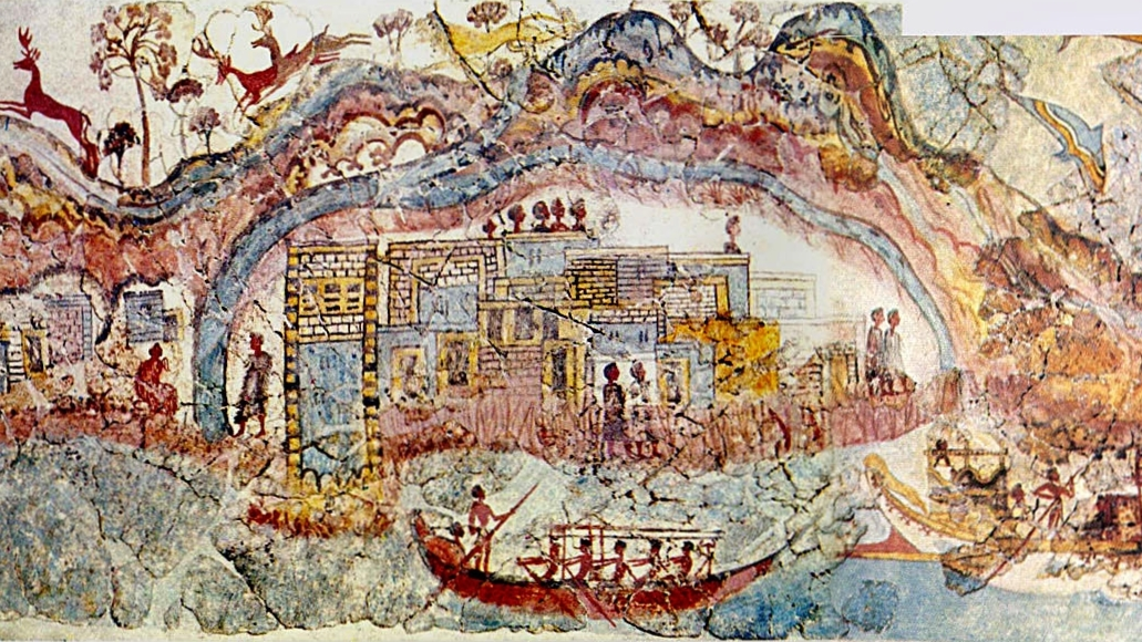 Schiffsfresko aus Raum 5 im Obergeschoss des Westhauses der Ausgrabungsstätte in Akrotiri auf Santorin, Kykladen, Griechenland